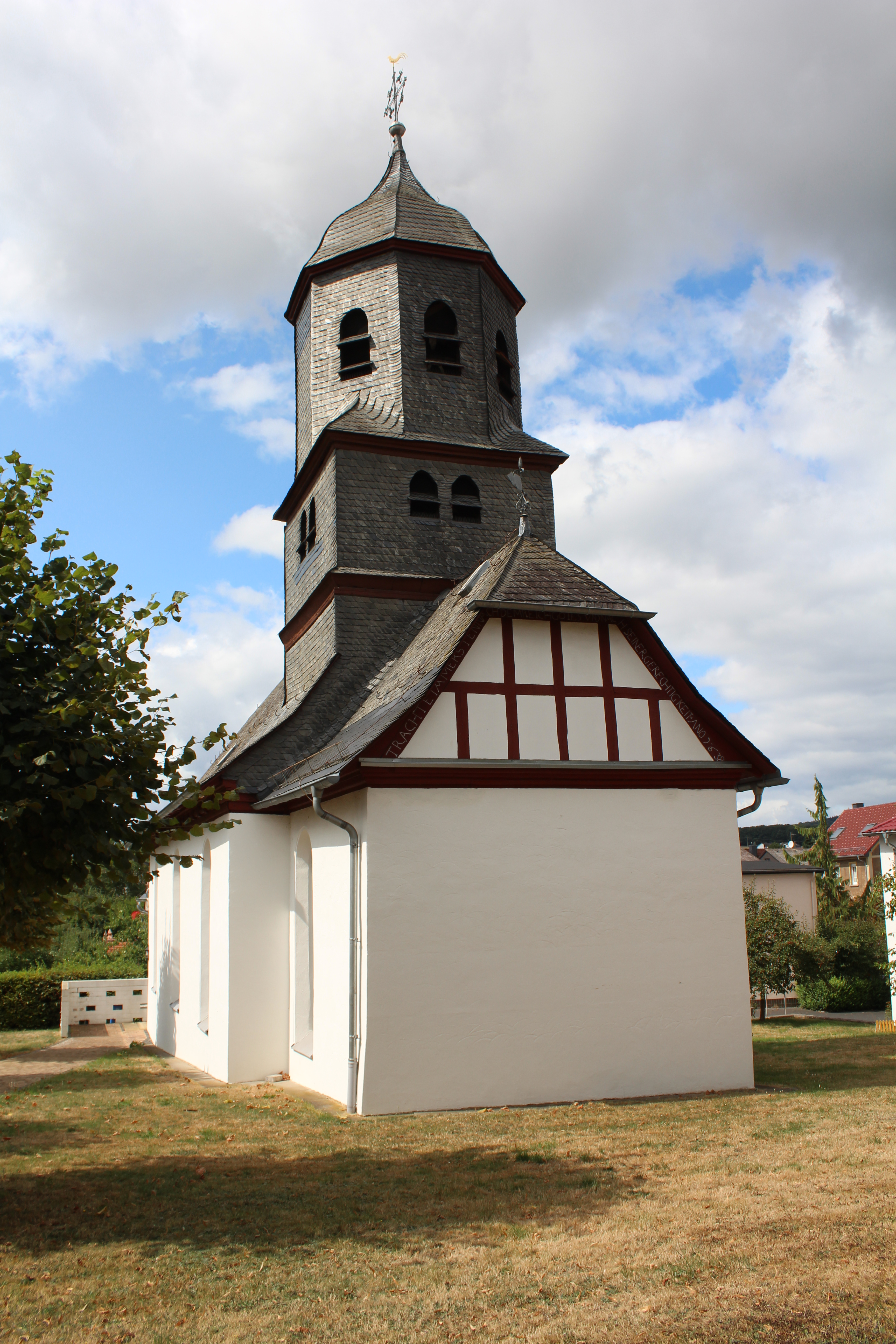 Evangelische Kirche Großrechtenbach, Gemeinde Hüttenberg, Lahn-Dill-Kreis, Hessen, Deutschland